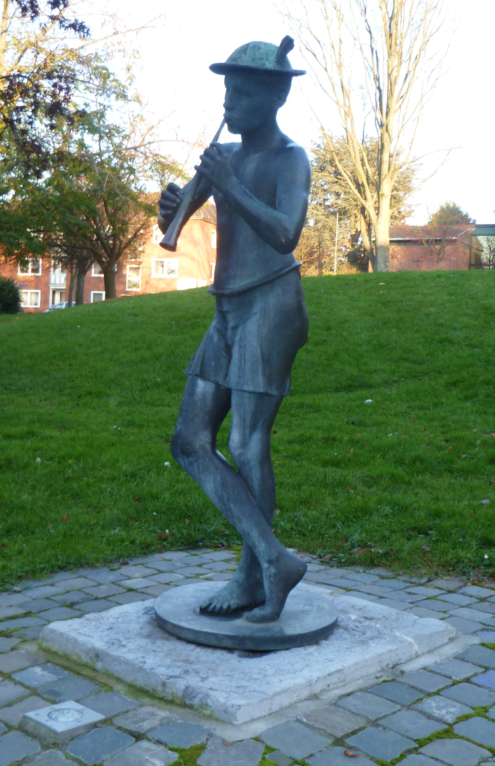 Skulptur Flötenspieler, Aachen, Matthias Corr, um 1920